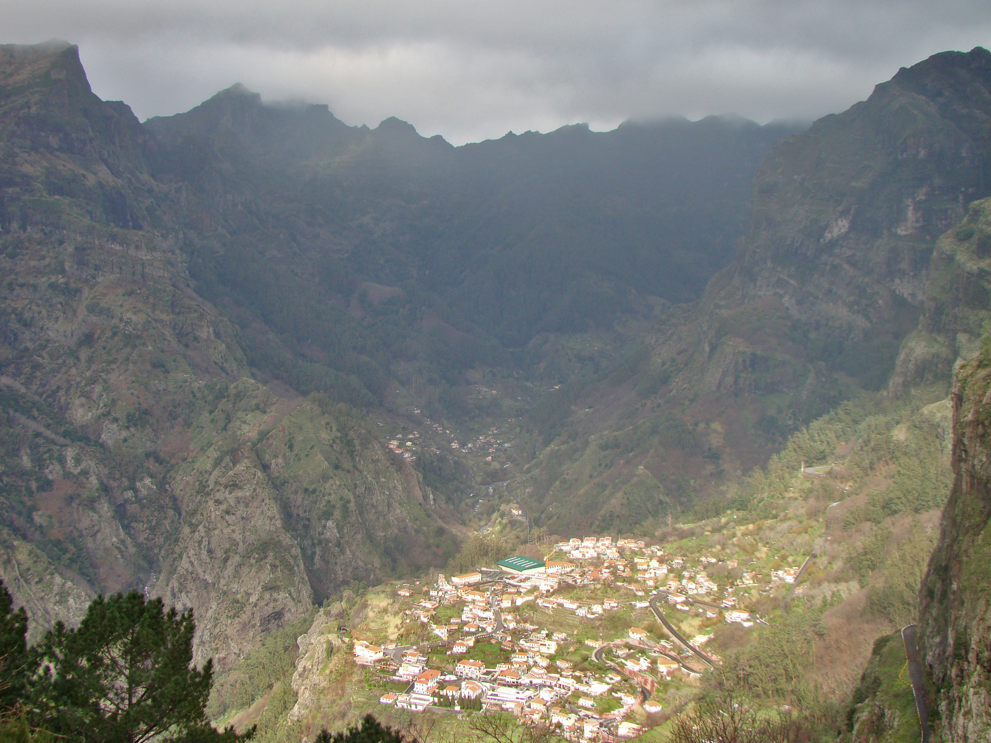 Curral das Freiras - Madeira